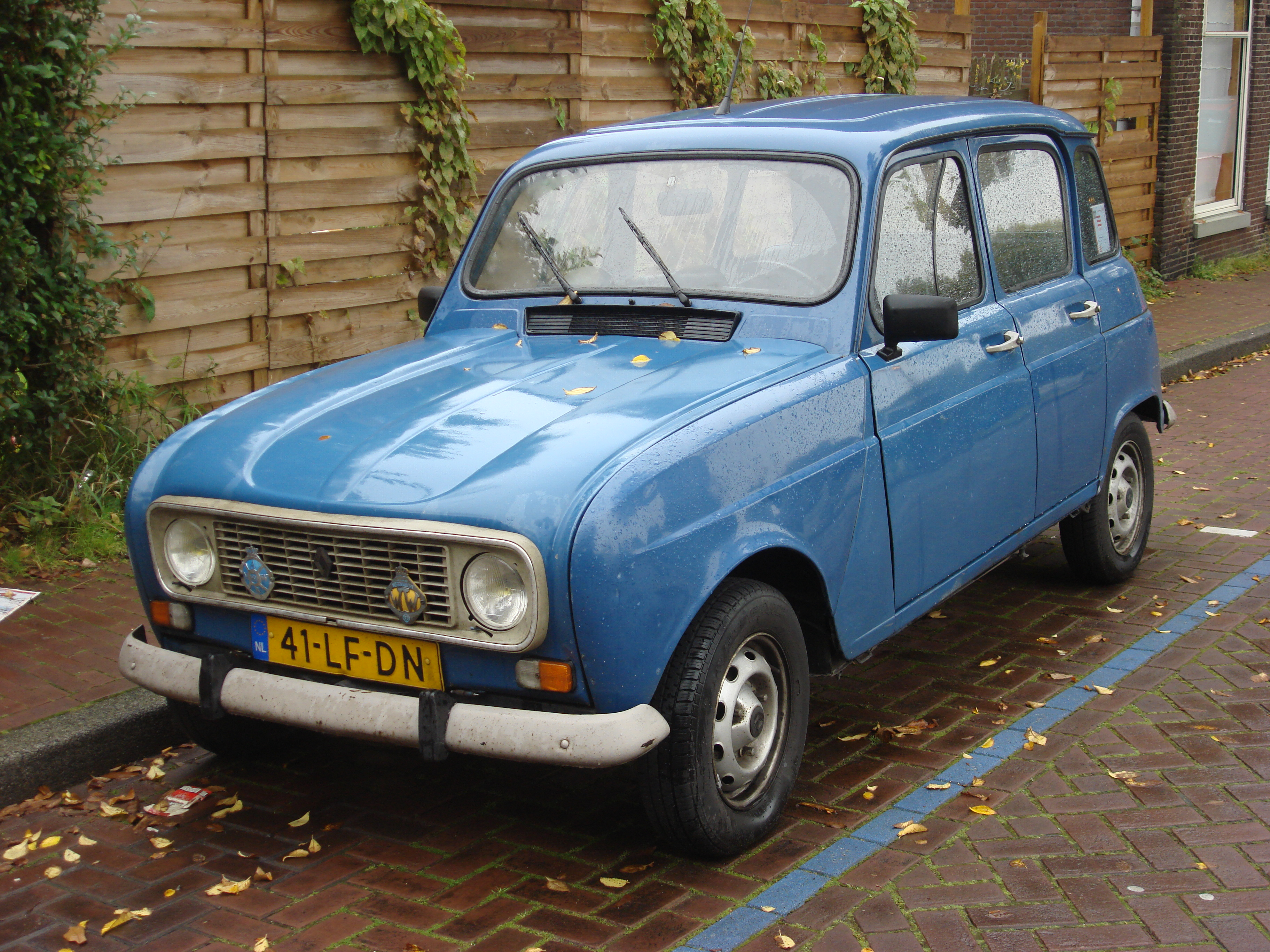 Renault 4 in Amsterdam